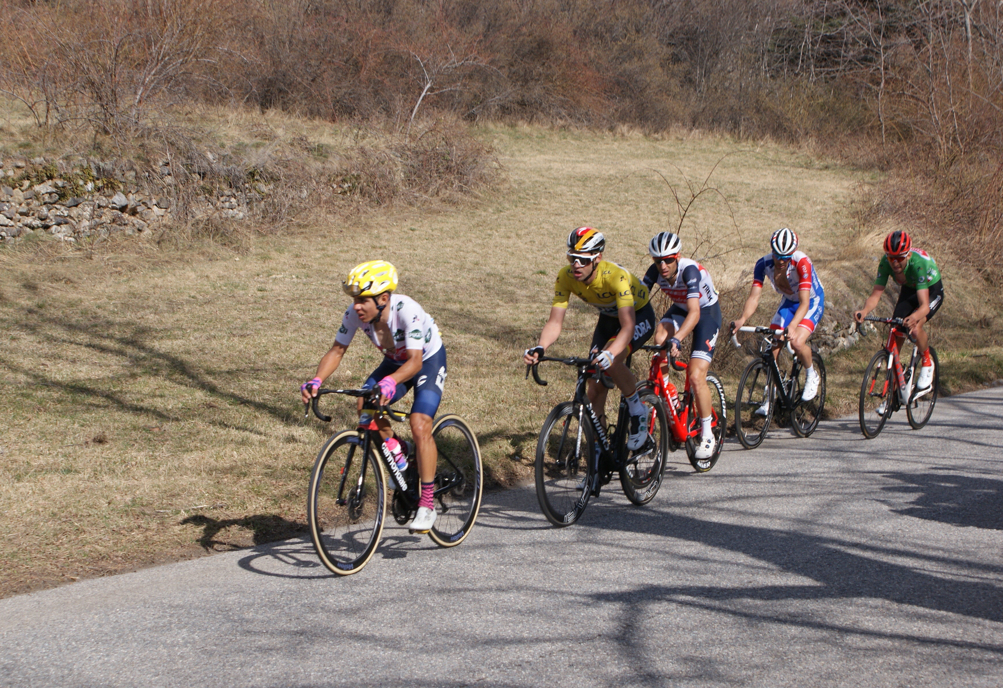 Paris-Nice 2020, 7e étape Colmiane